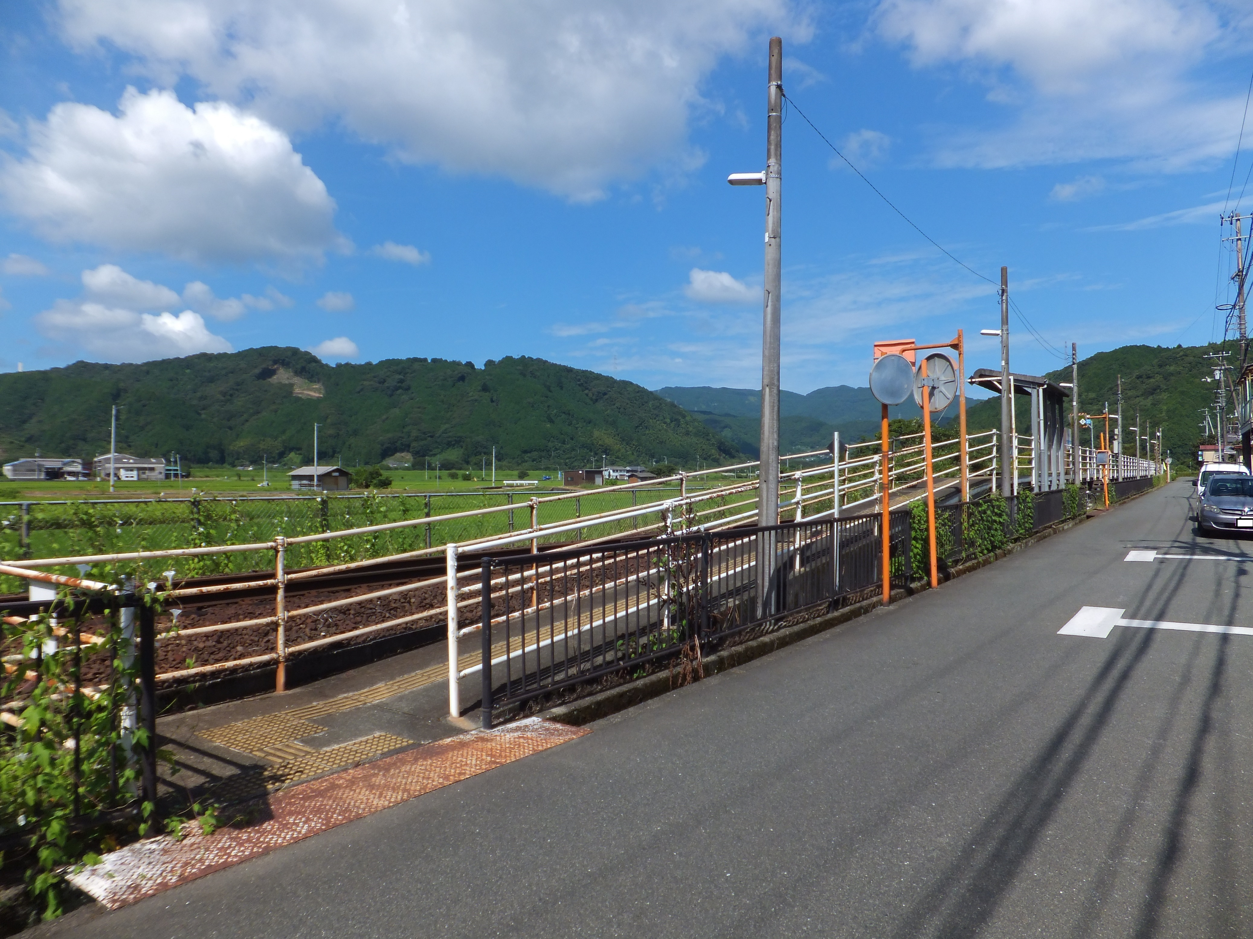 愛媛県大洲市 JR四国予讃線 春賀駅